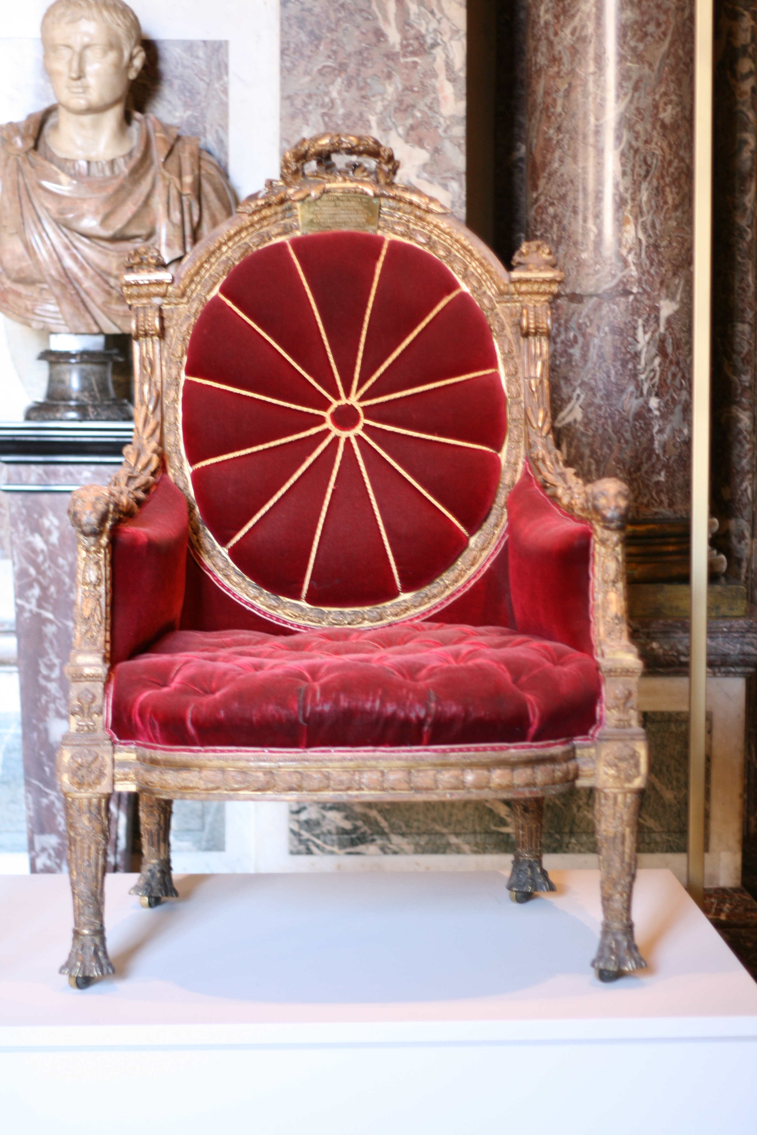 Trône de Louis XVI pour l'Ambasse de France à Londres, 1783, par François II Foliot et Toussaint Foliot. Photographie prise au Château de Versailles